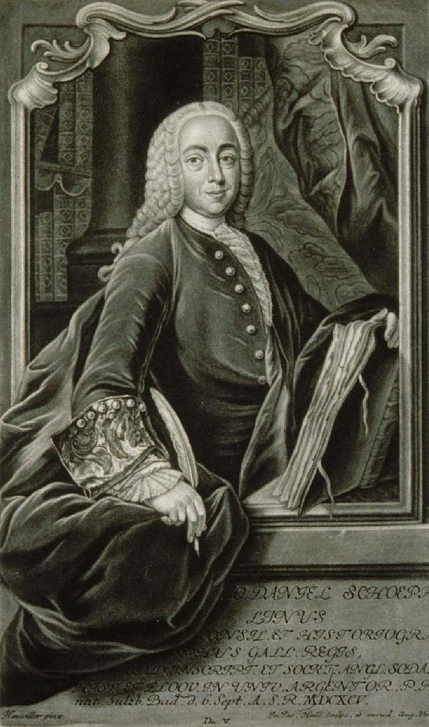 Jo. Daniel Schœpflinus, Consil et Historiographus Gall. Regis. Acad. Inscript. et Societ. Angl. Sodal. Hist. et Eloqu. in Univ. Argentor. P.P. (1694-1771), Mi-corps, 3/4 à dr. avec encadrement. Bibliothèque nationale et universitaire de Strasbourg